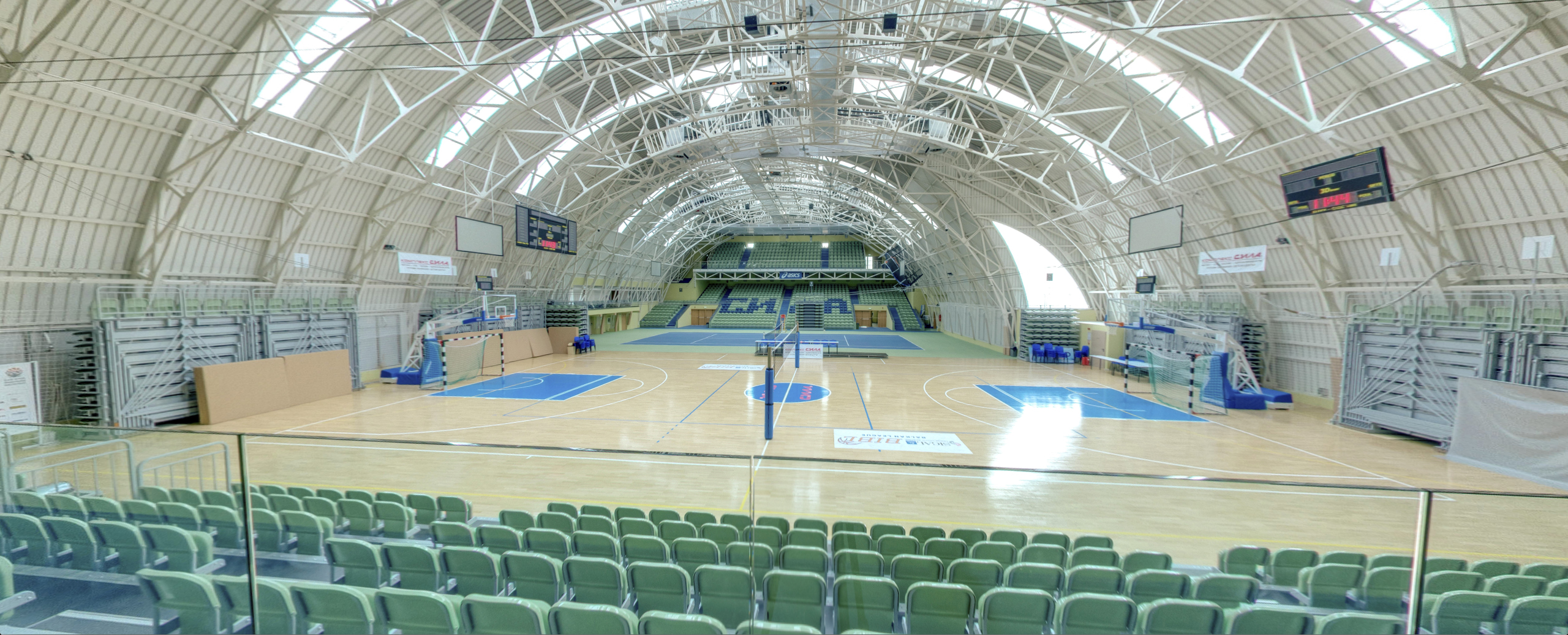 Спортна зала Комплекс С.И.²Л.А.